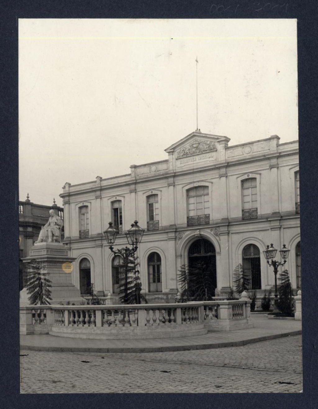 Vista del Palacio del Real Tribunal del Consulado de Santiago, ocupado por la Biblioteca Nacional de Chile entre 1886 y 1925.